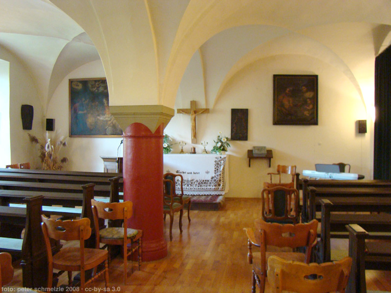 Schlosskapelle in Schloss Horneck in Gundelsheim